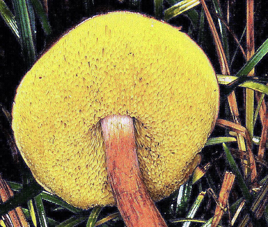 アシナガイグチ Ashi-naga-iguchi Boletelus elatus Bolet à pied élancé, Japon